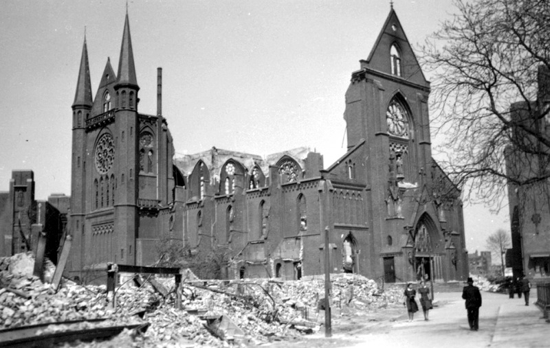 Gezicht op de door het Duitse bombardement van 14 mei 1940 getroffen r.k. kerk van Sint Antonius van Padua ook wel genoemd de Bosjeskerk aan het Bosje.